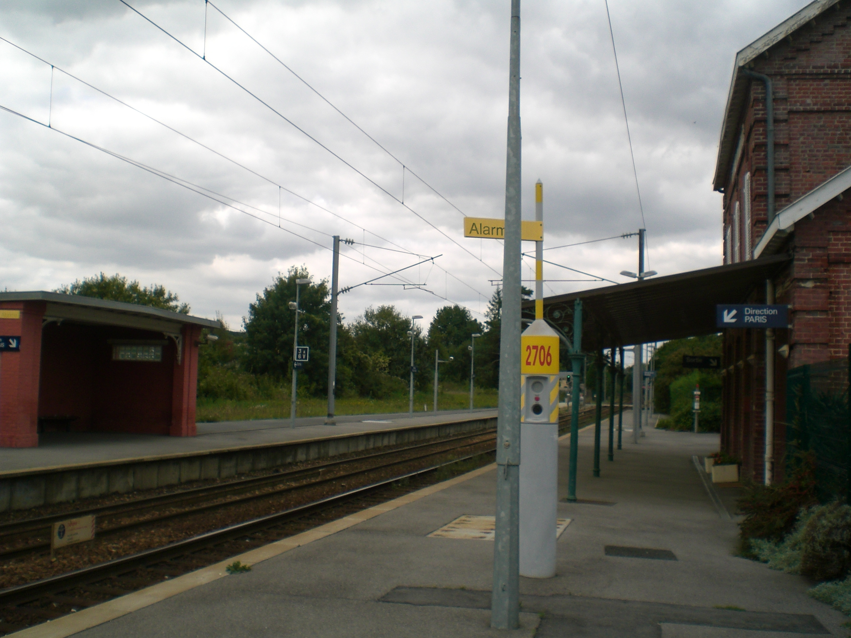 quai de la Gare de Bornel-Belle-Église, Oise, France